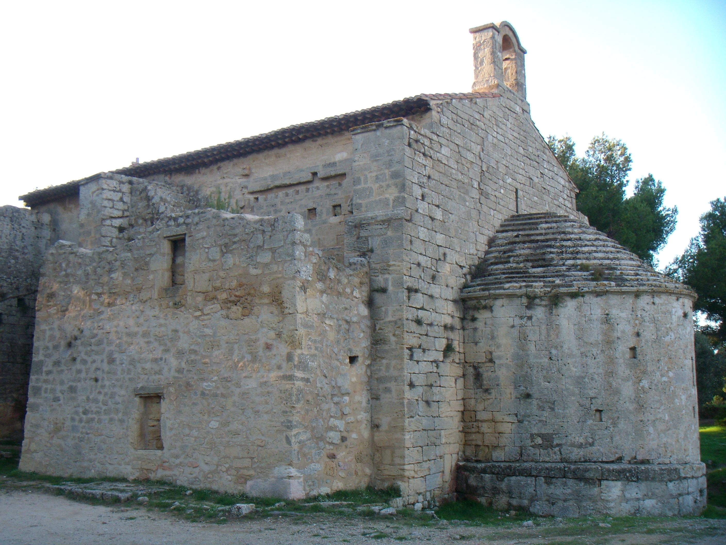 Chapelle Saint-Blaise, (Classé, 1939)